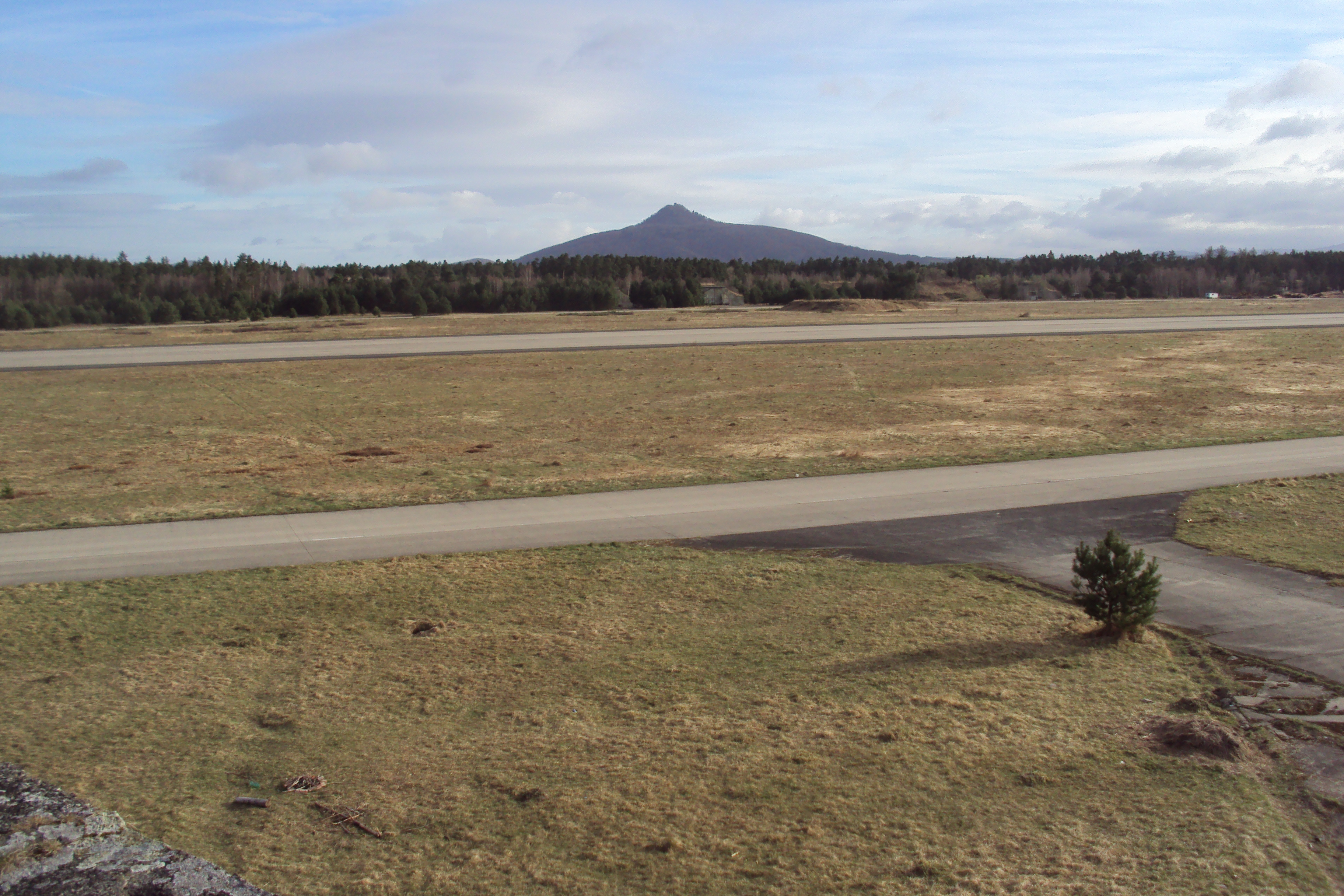 Letiště Hradčany, vzadu Ralsko